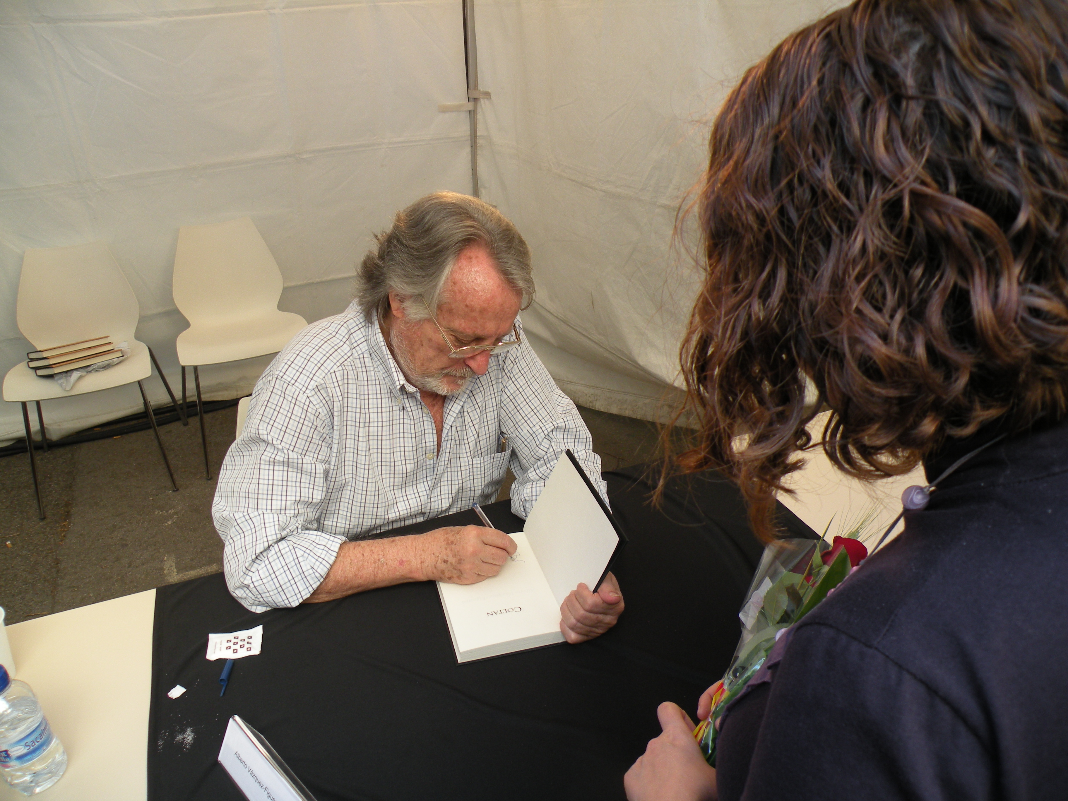 Firma de Alberto Vázquez Figueroa